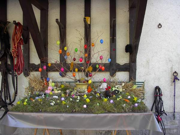 Vor einem Pferdestall auf gebauter Osterschmuck Foto : W.Thiel (eigenes Foto)